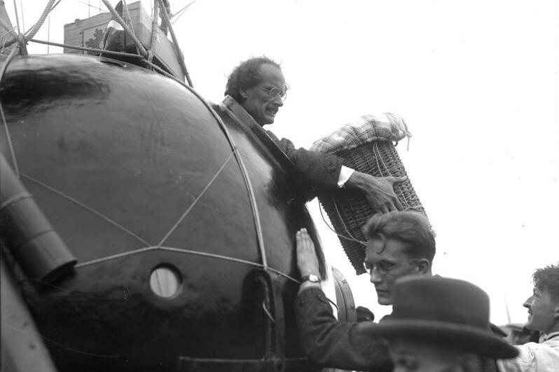 Der bekannte Höhenforscher Professor Piccard, bereitet sich in der Schweiz auf seinen neuen Stratosphärenflug vor ! Vorbereitungen zu dem neuen Höhenflug Prof. Piccards ! Die Vorbereitungen auf dem Flugplatz Dübendorf bei Zürich. Prof. Piccard bringt die Instrumente für seine Forschungen in die Gondel.